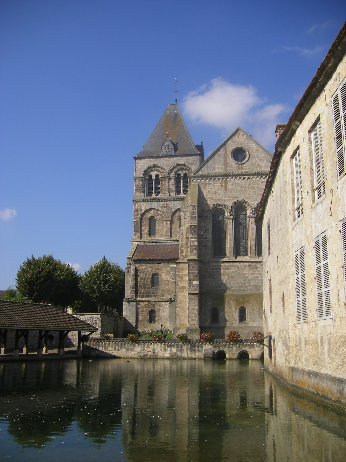 Vertus